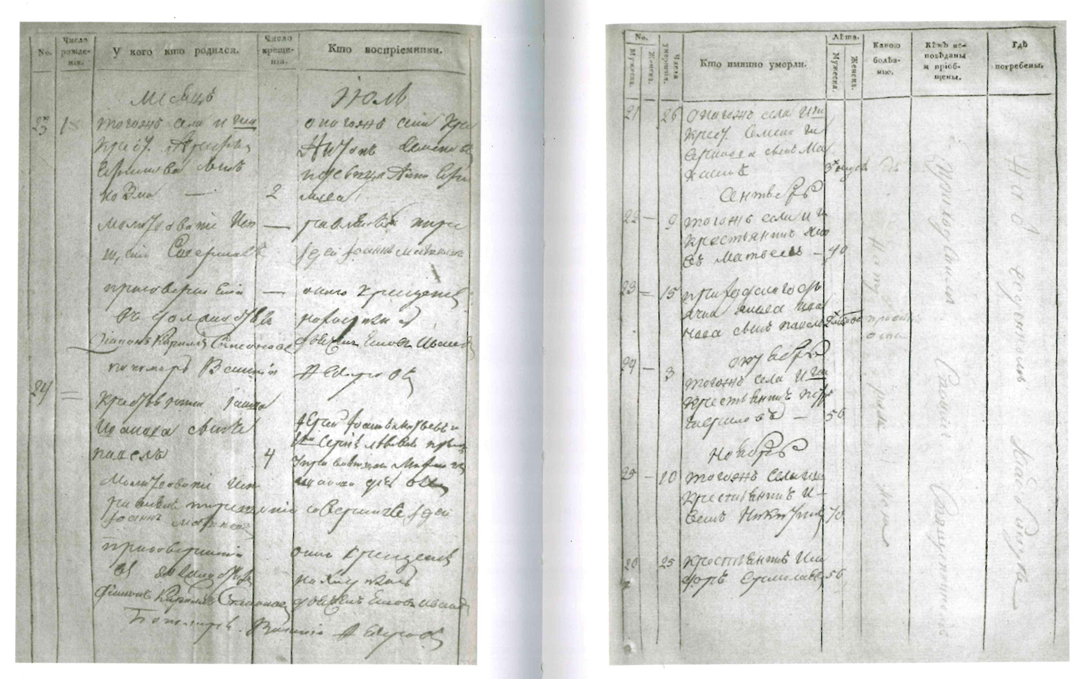 Записи в метрической книге церкви Успения Пресвятой Богородицы села Болдино о рождении, крещении и смерти Павла, сына А. С. Пушкина и О. М. Калашниковой. ГАНО, Ф.570, ОП. 5596, год 1826, л. 232 об (слева) и л. 251 (справа)